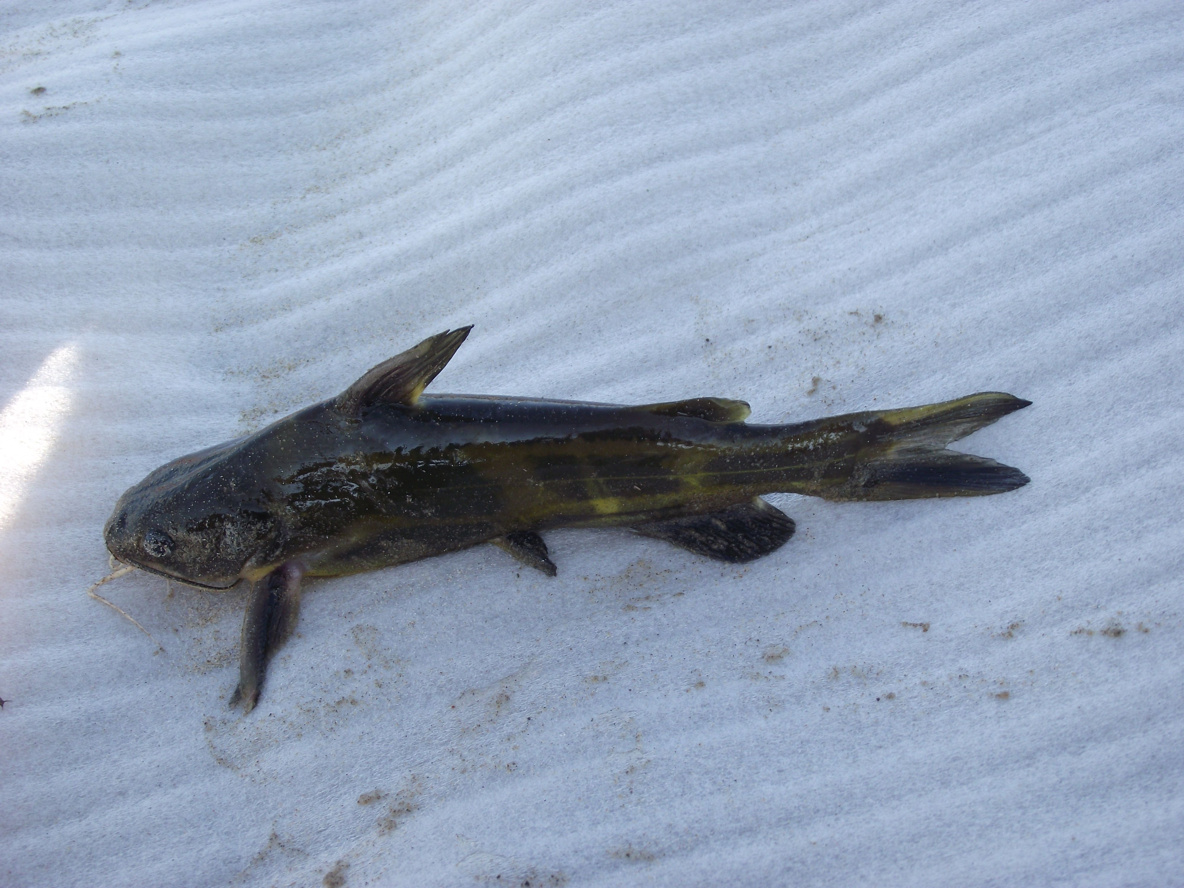 Рыба КОСАТКА поймана в Амуре